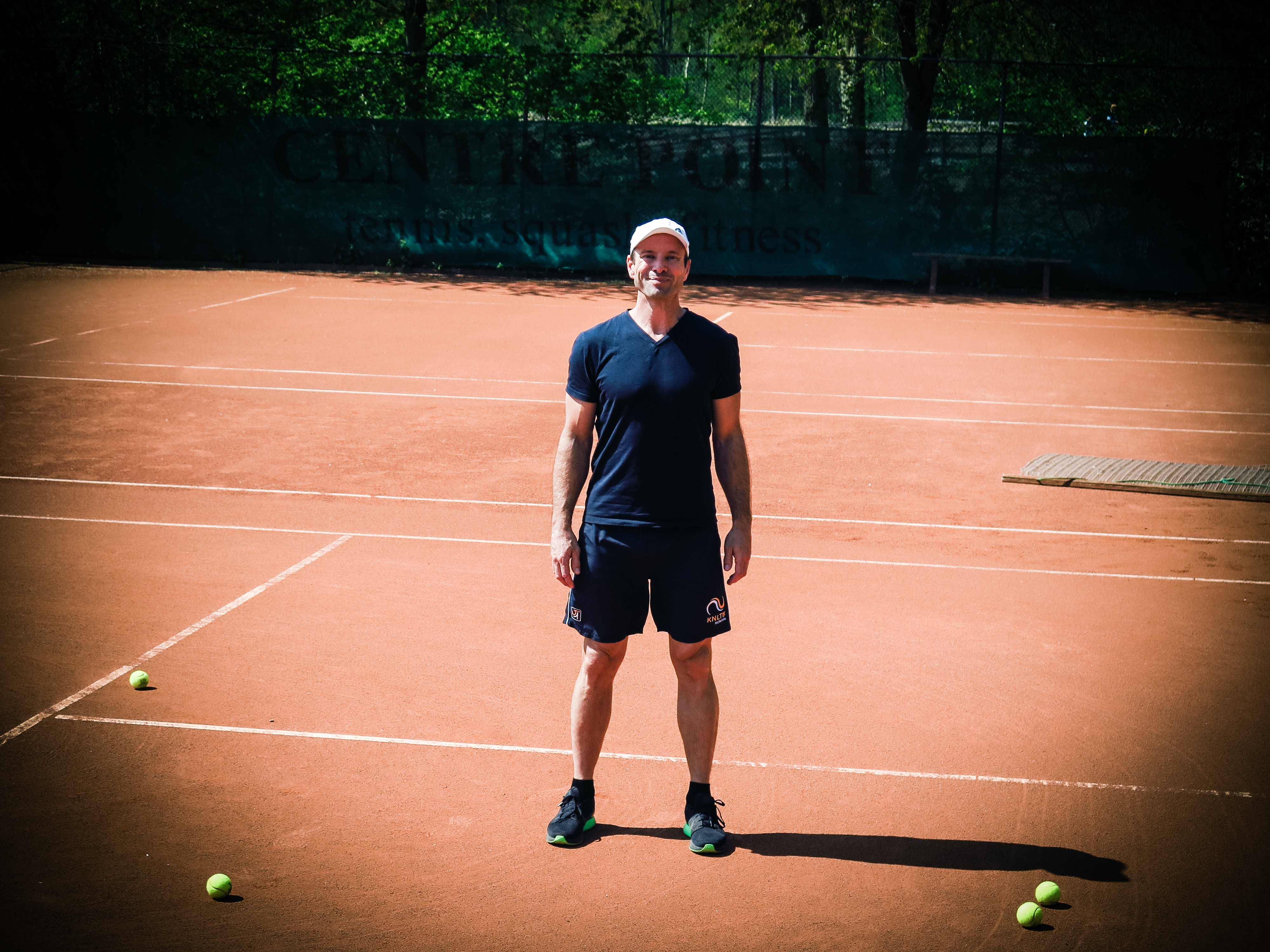 Miguel Janssen in Almere